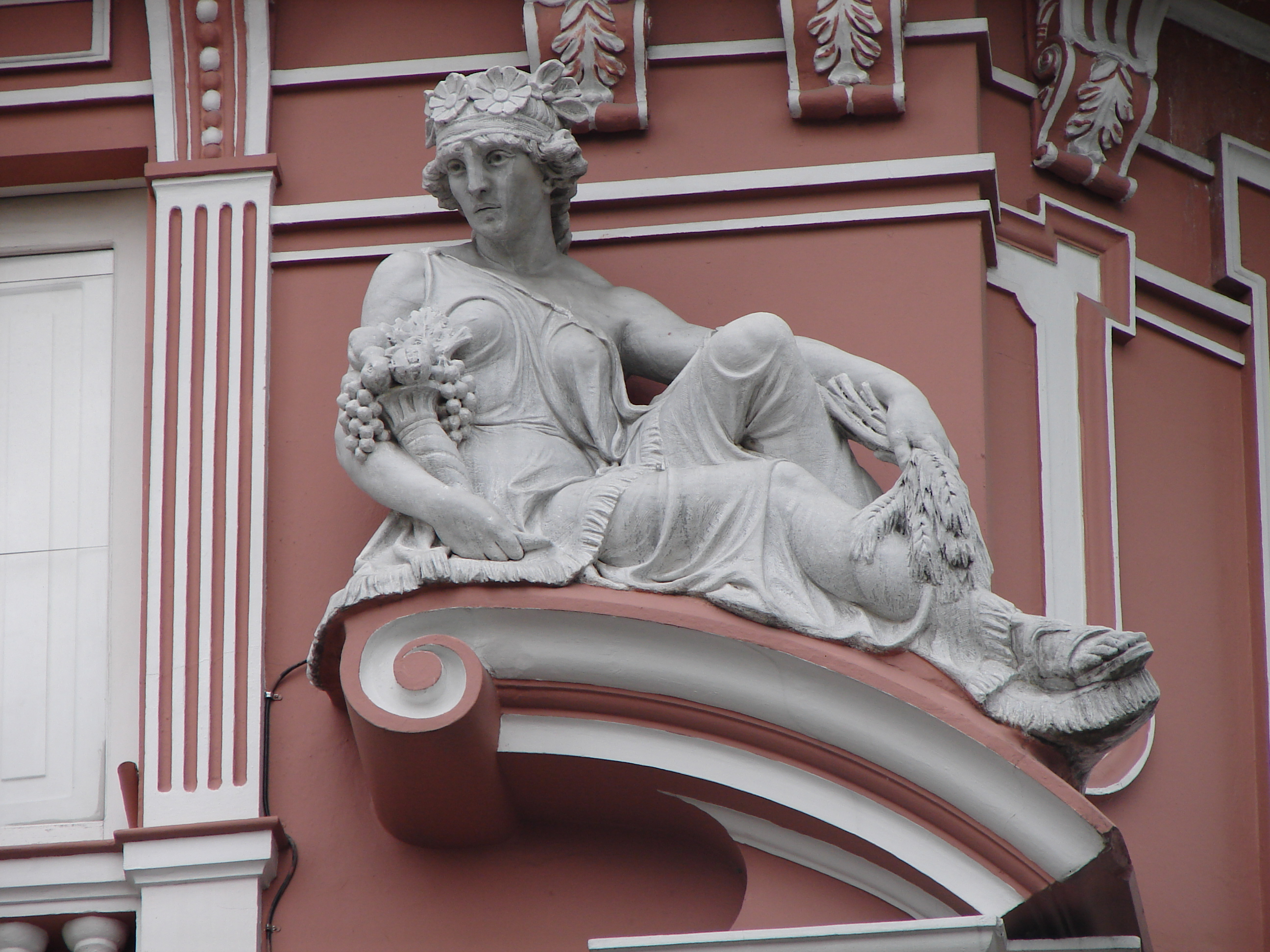 Antiguo Hotel Europa